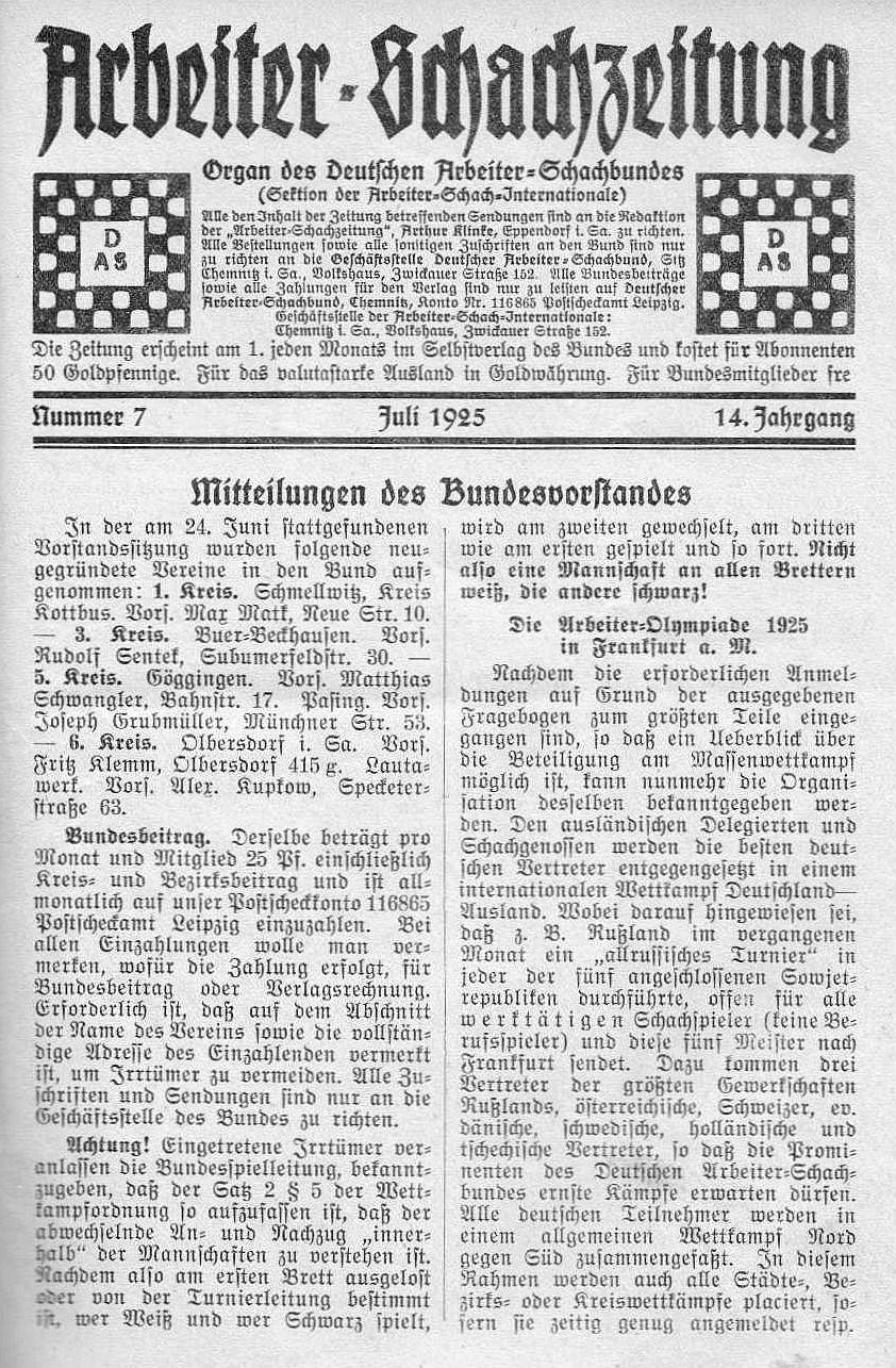 Scan der ersten Seite des Juli-Heftes der Arbeiter-Schachzeitung 1925